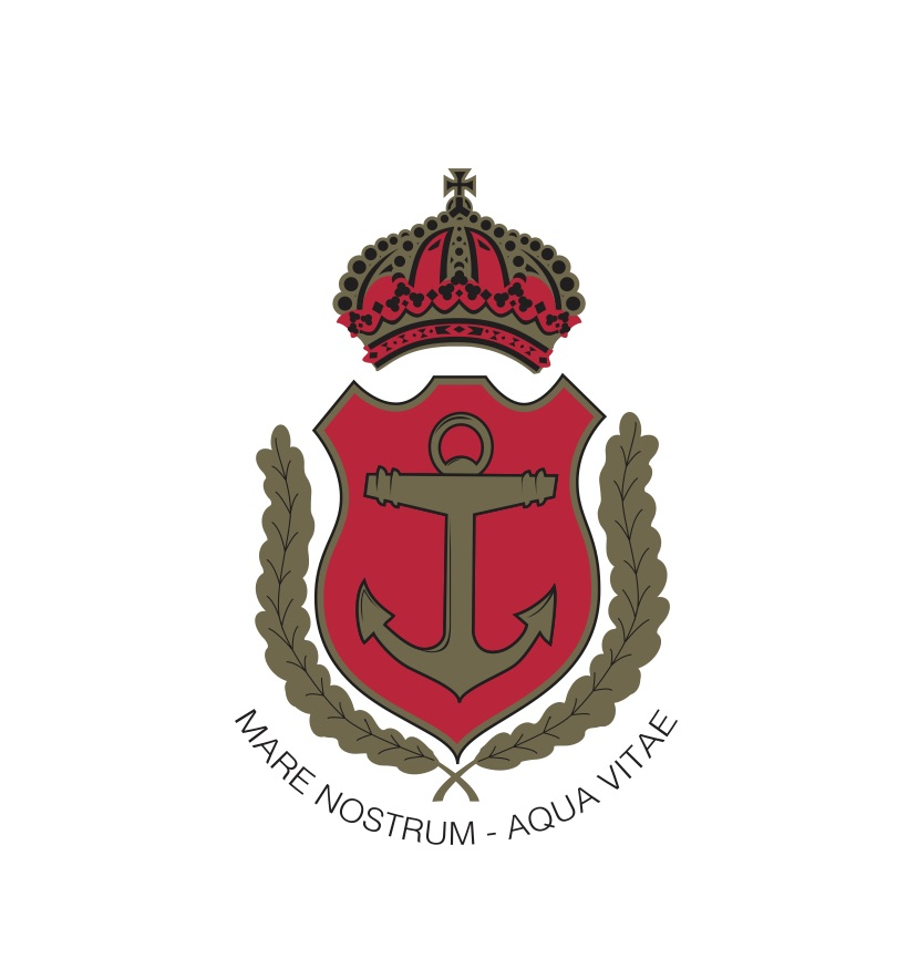 Skapat för föreningen som blazermärke